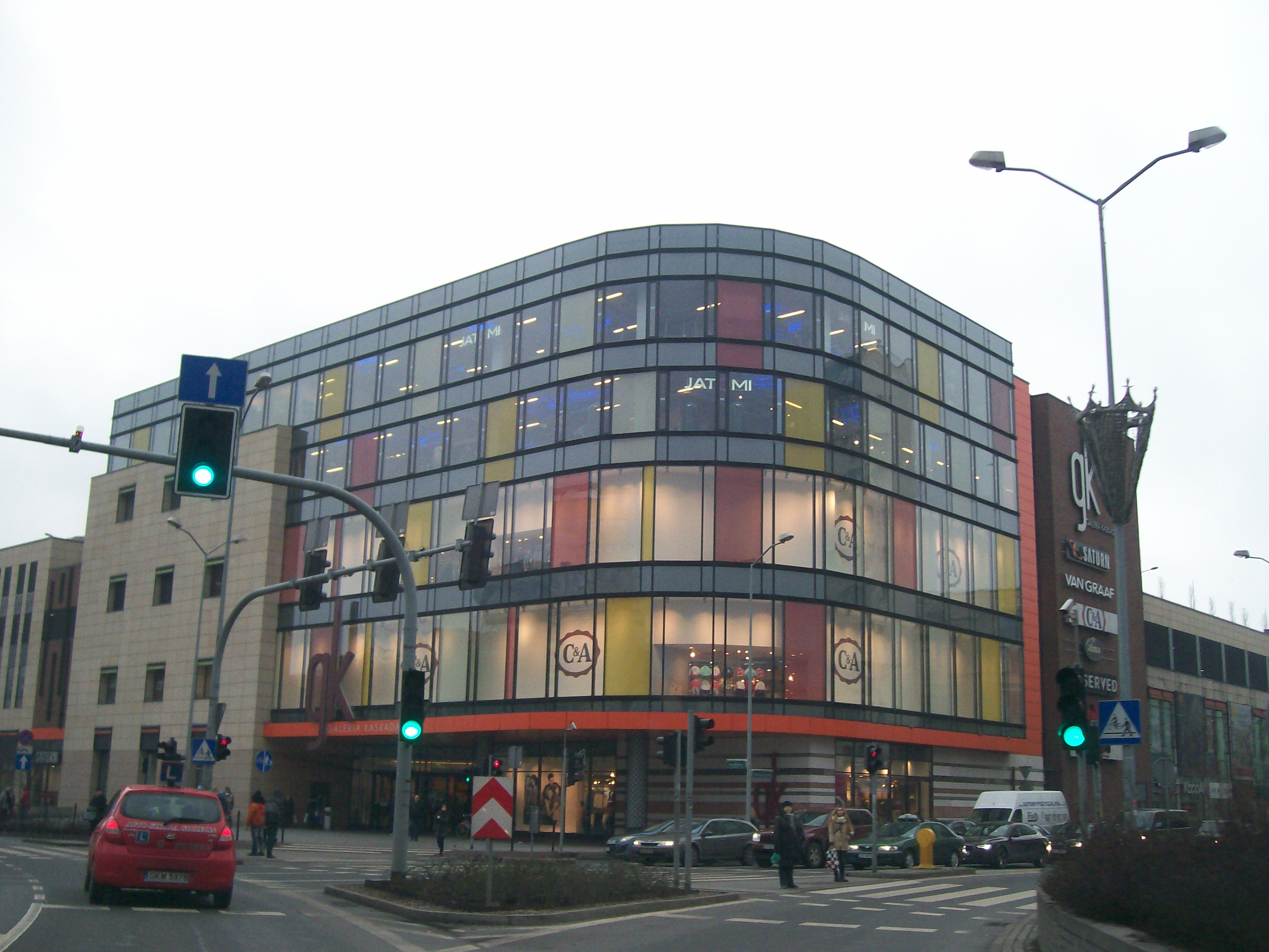 Galeria Kaskada w Szczecinie